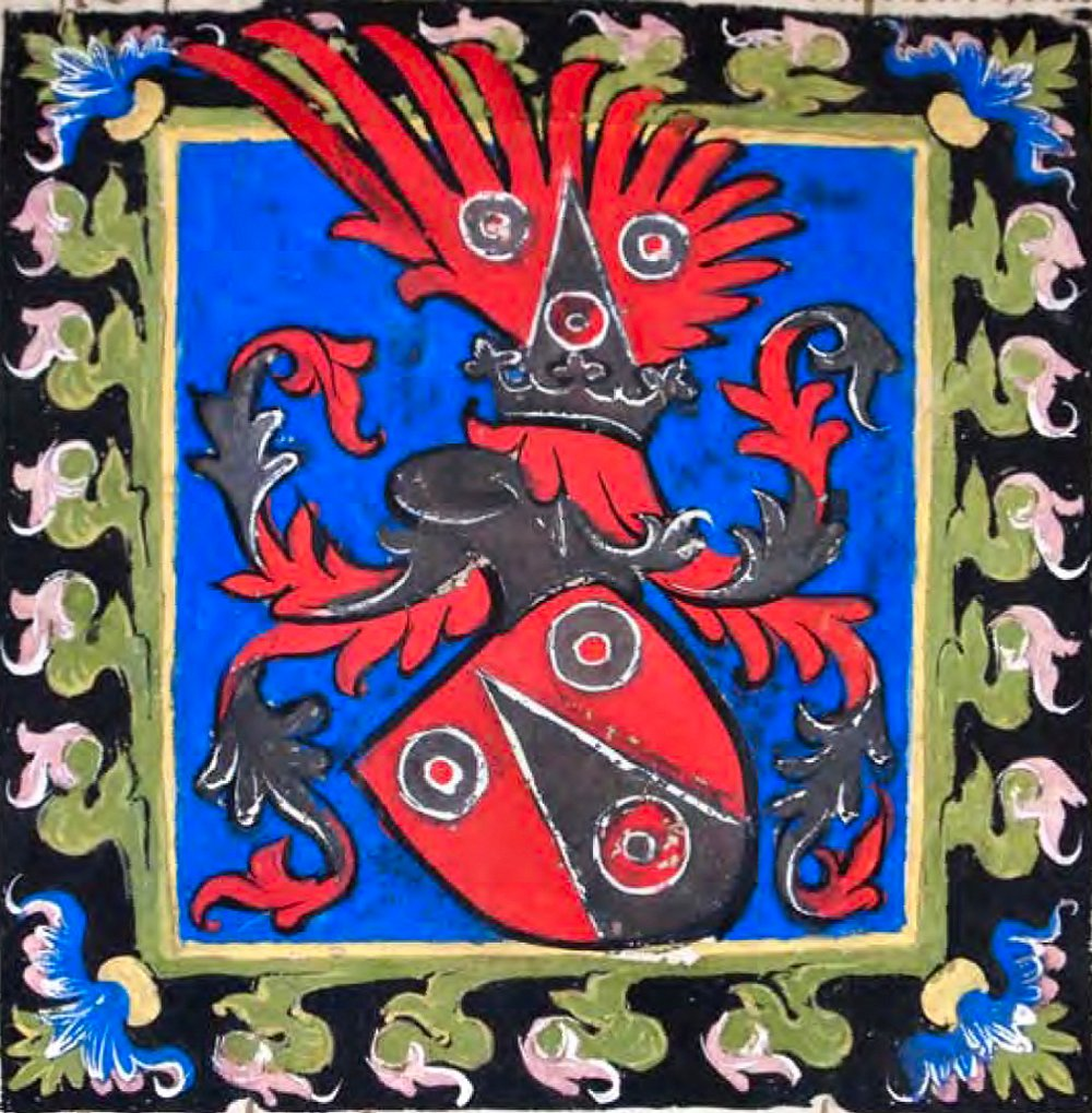 Stammwappen derer Schlick im Wappenbrief von Rom.-Dt. König Sigismund von 1416